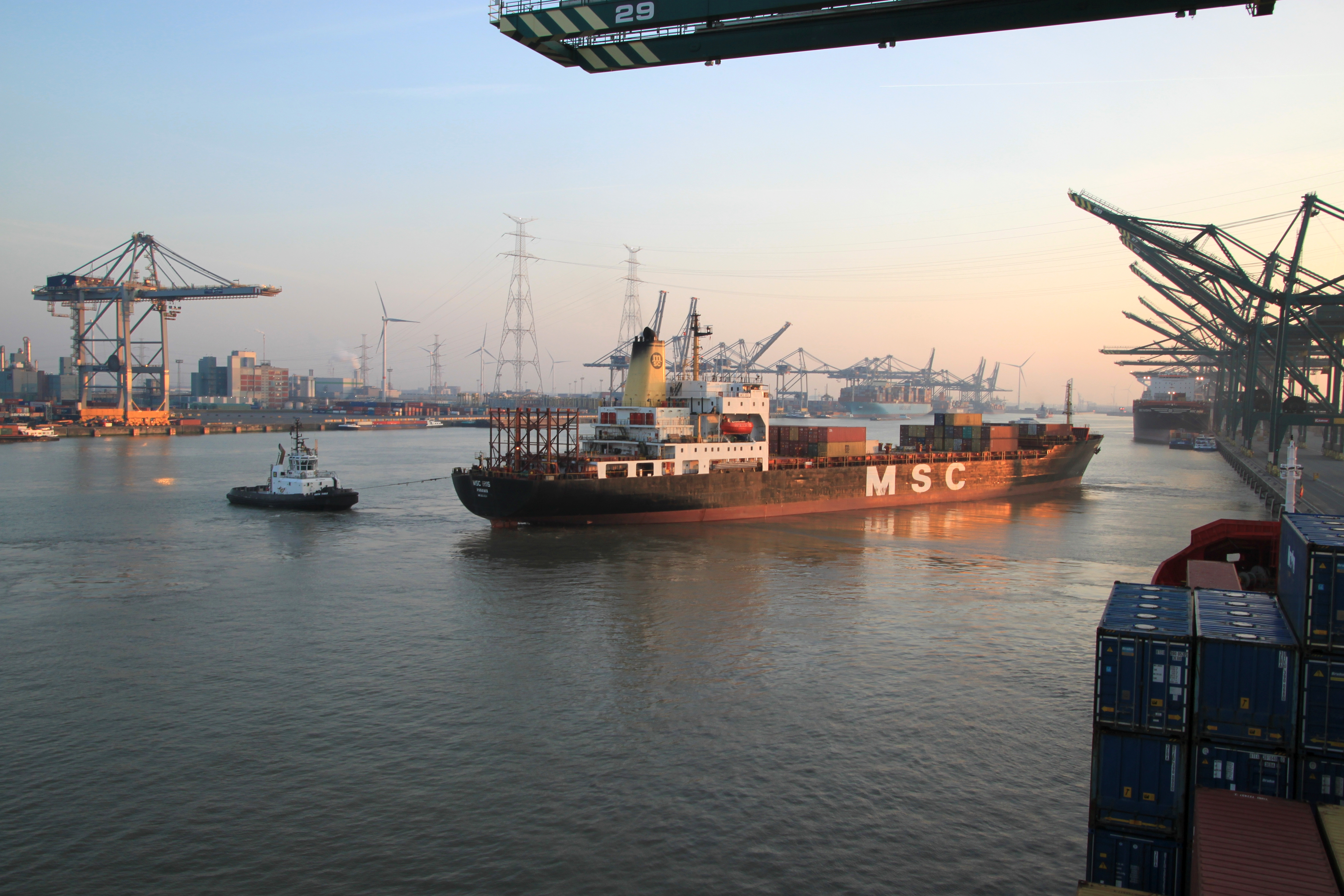 MSC IRIS verlässt das MPET-Terminal im Deurganckdock Antwerpen